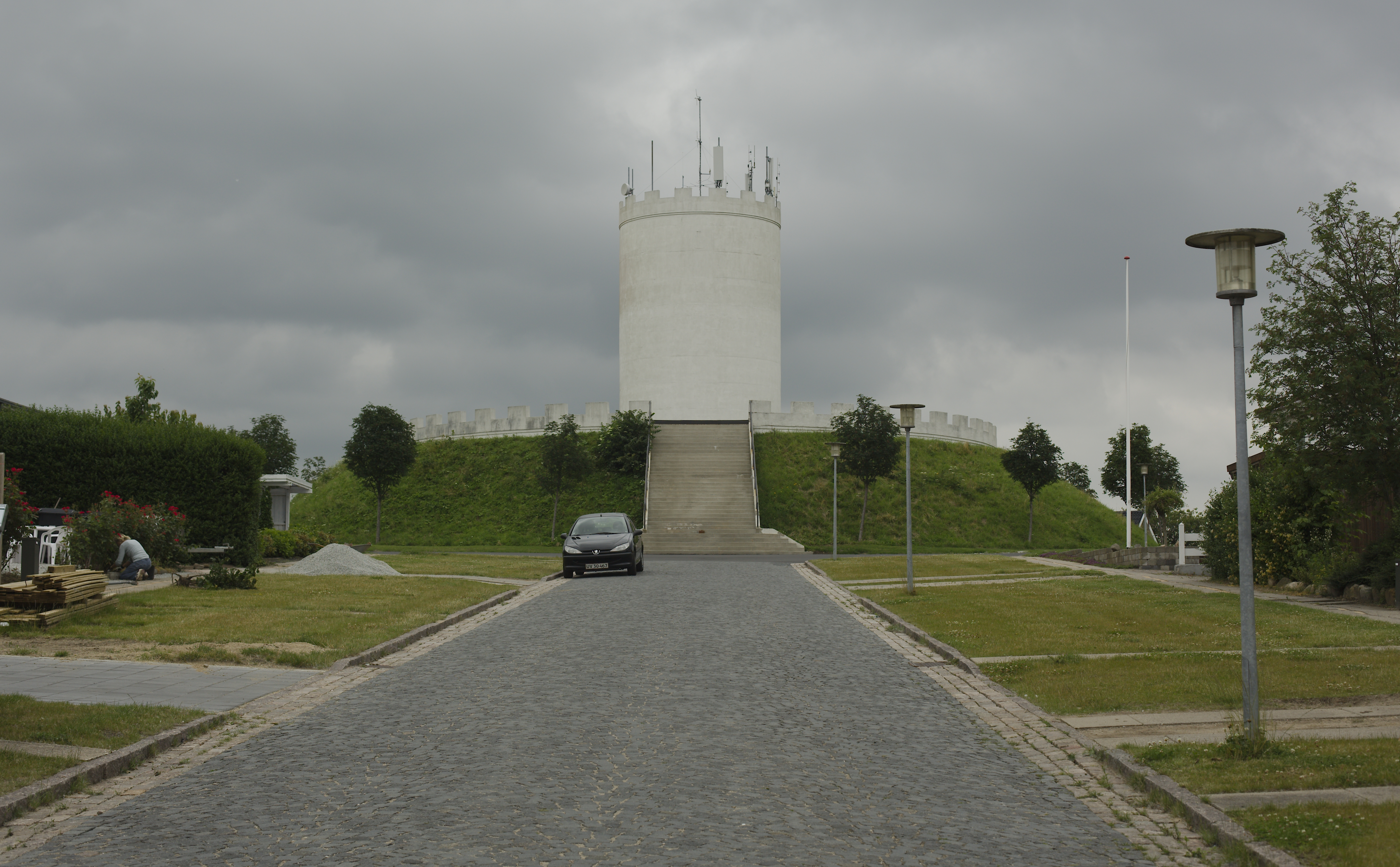 Solvang vandtårn, Sønderborg